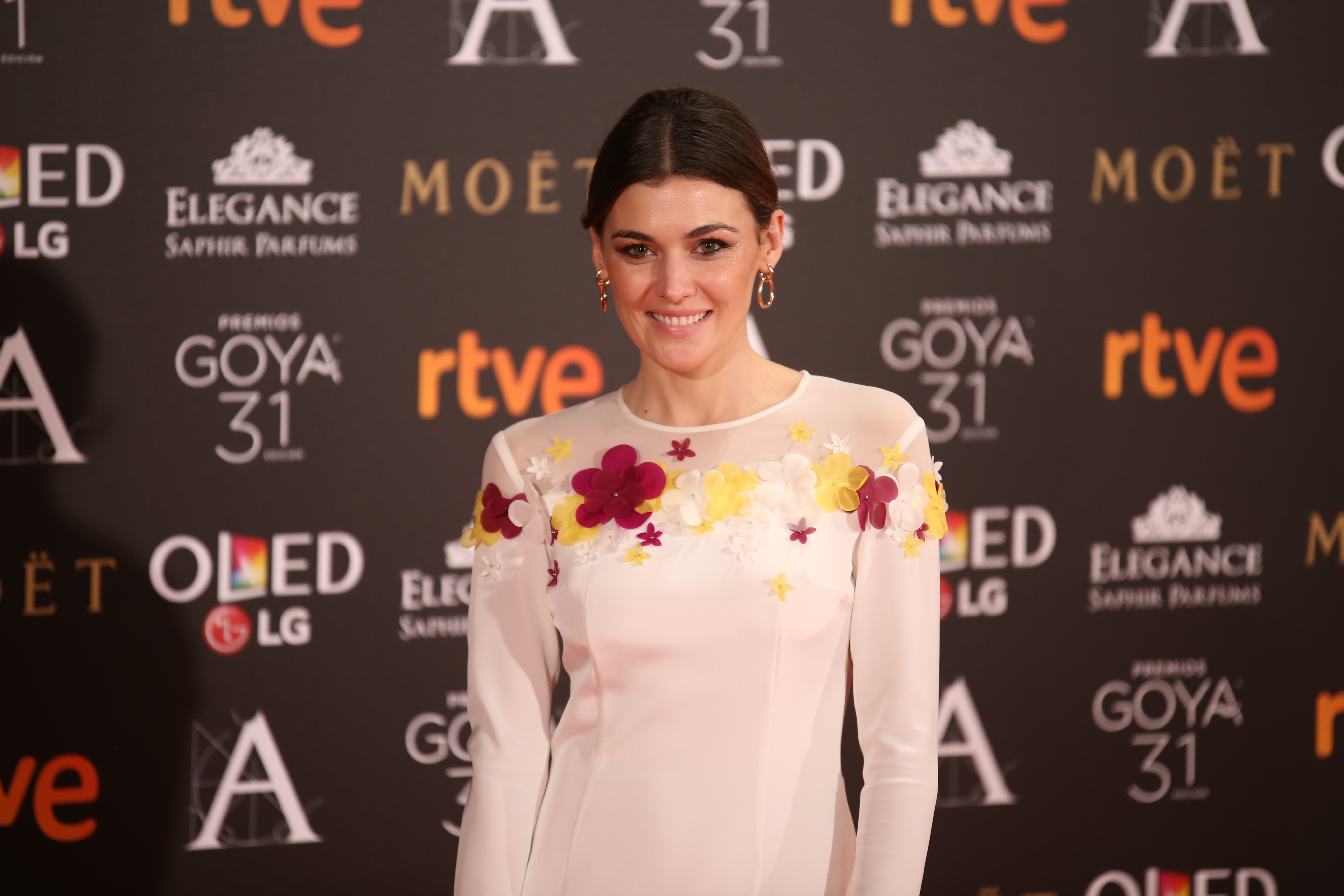 Premios Goya 2017